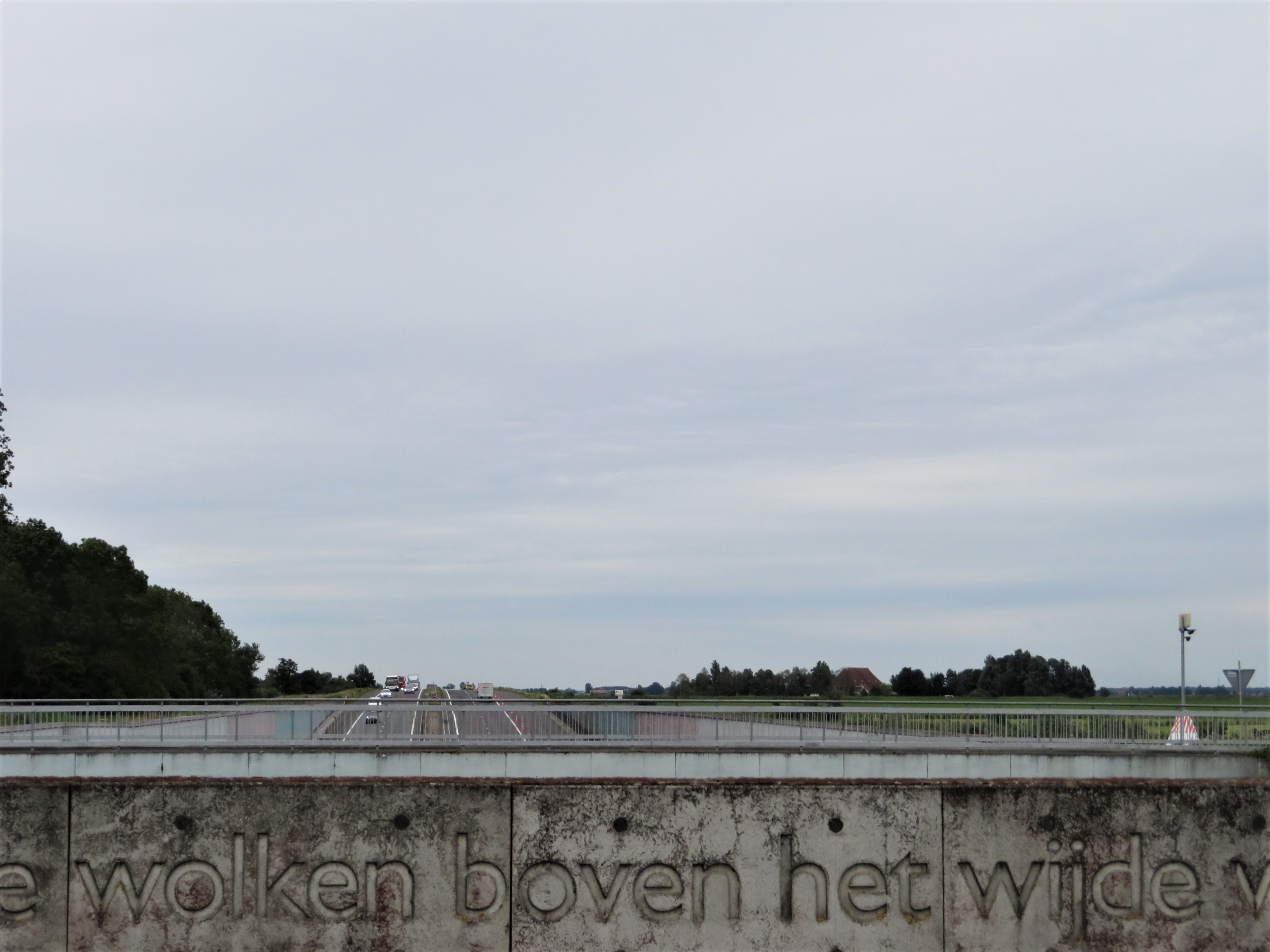 Dichtregels op de betonnen rand: ‘Iemand anders kijkt naar de langzame tocht van de wolken boven het wijde water en de grazige weiden’ en ‘Iemand anders luistert naar de voort-zoevende auto’s en vrachtwagens over de weg onder het water door’ door Jacques Peeters in 2007 geplaatst in het kader van kunstproject Woordenstroom